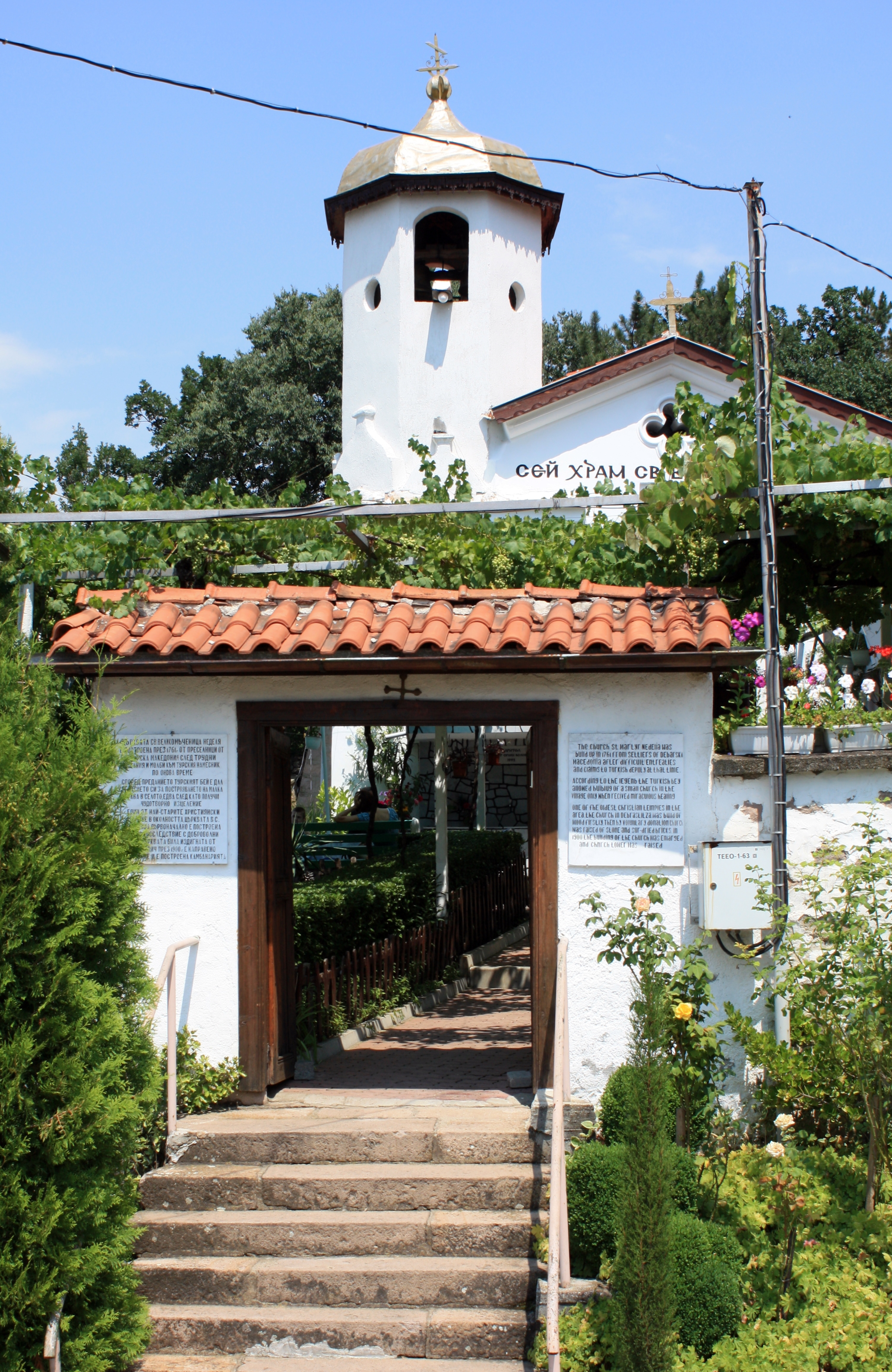 Kirche Hl. Nedelja in Debraschtiza, Bulgarien. Erbaut 1761.